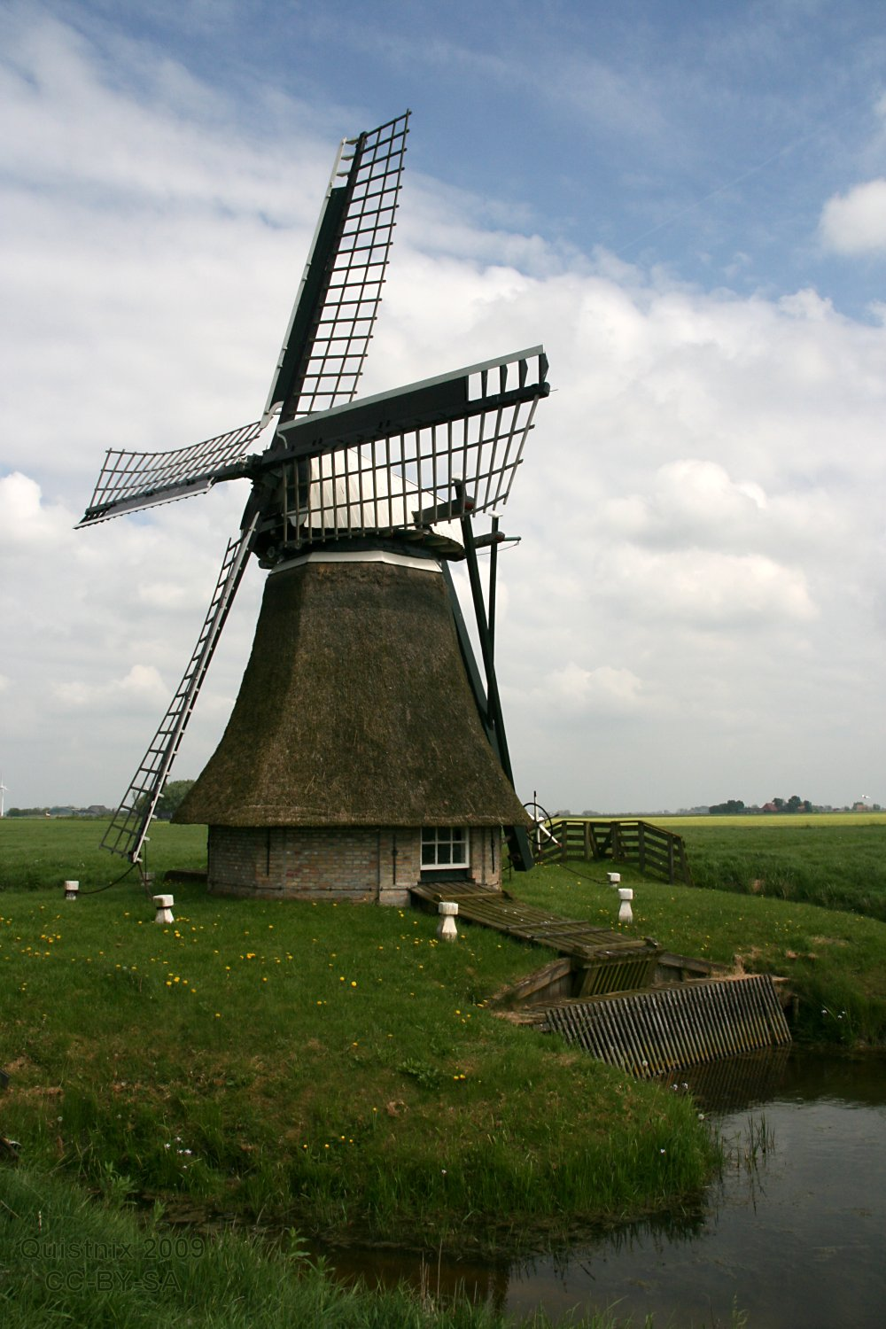 Oosterend: Rispensepoldermolen